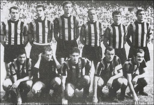 La rosa dell'Inter nella stagione 1965-1966. Licensing 1965-1966